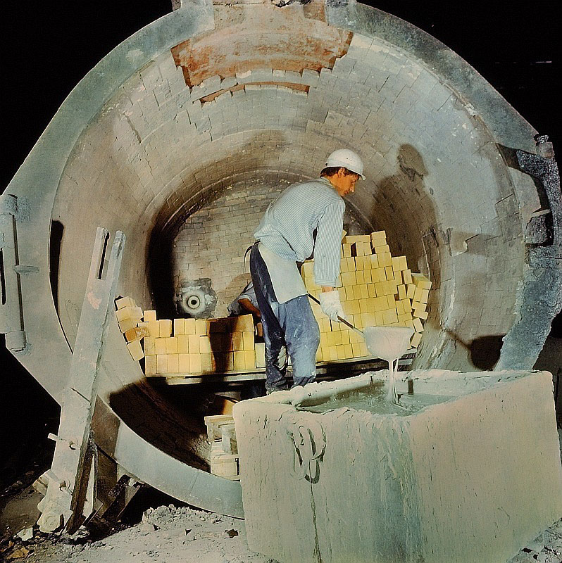 Original image description from the Deutsche FotothekFeuerungs- und Industrieofenbauer